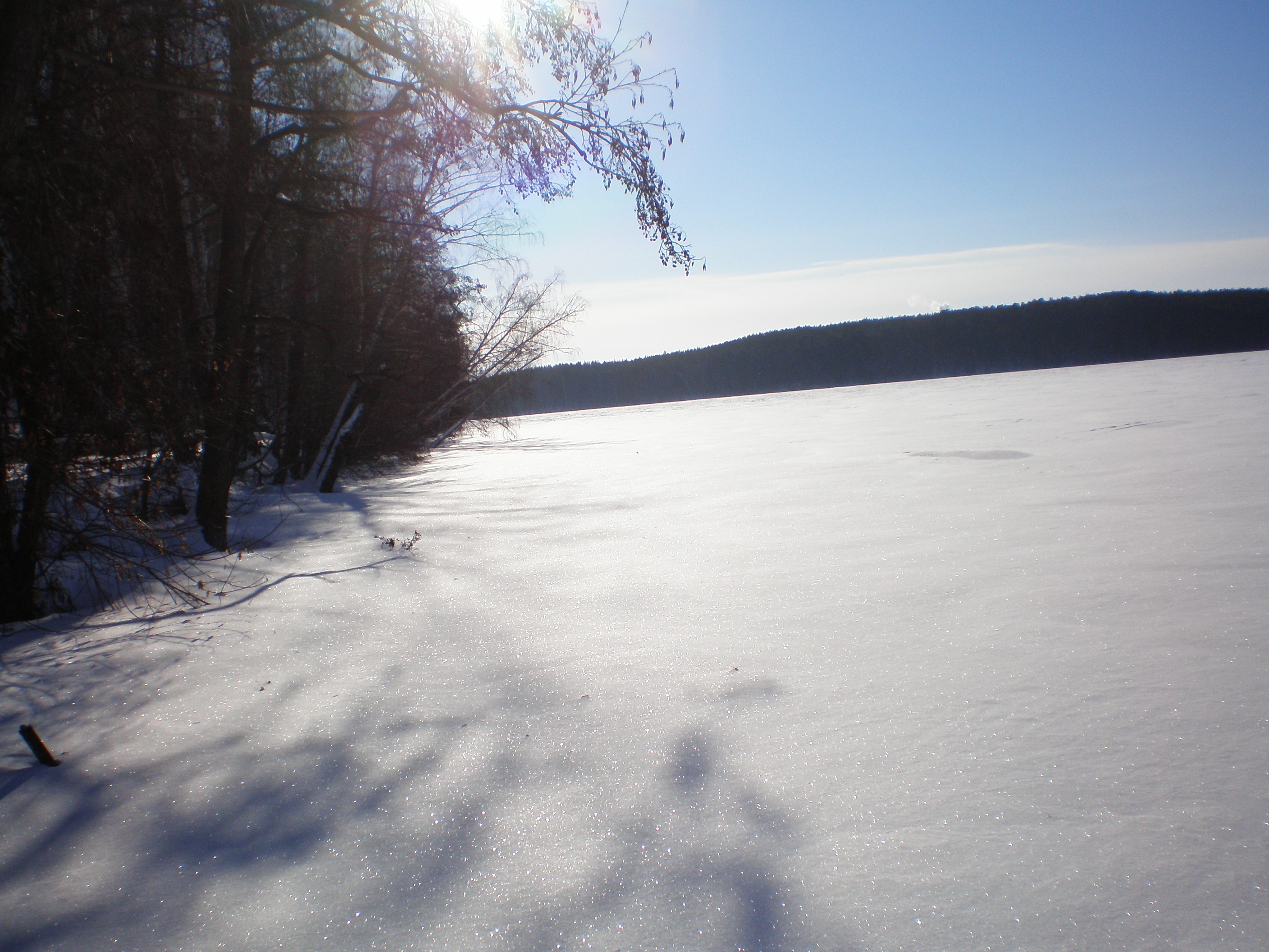 оз. Теренкуль